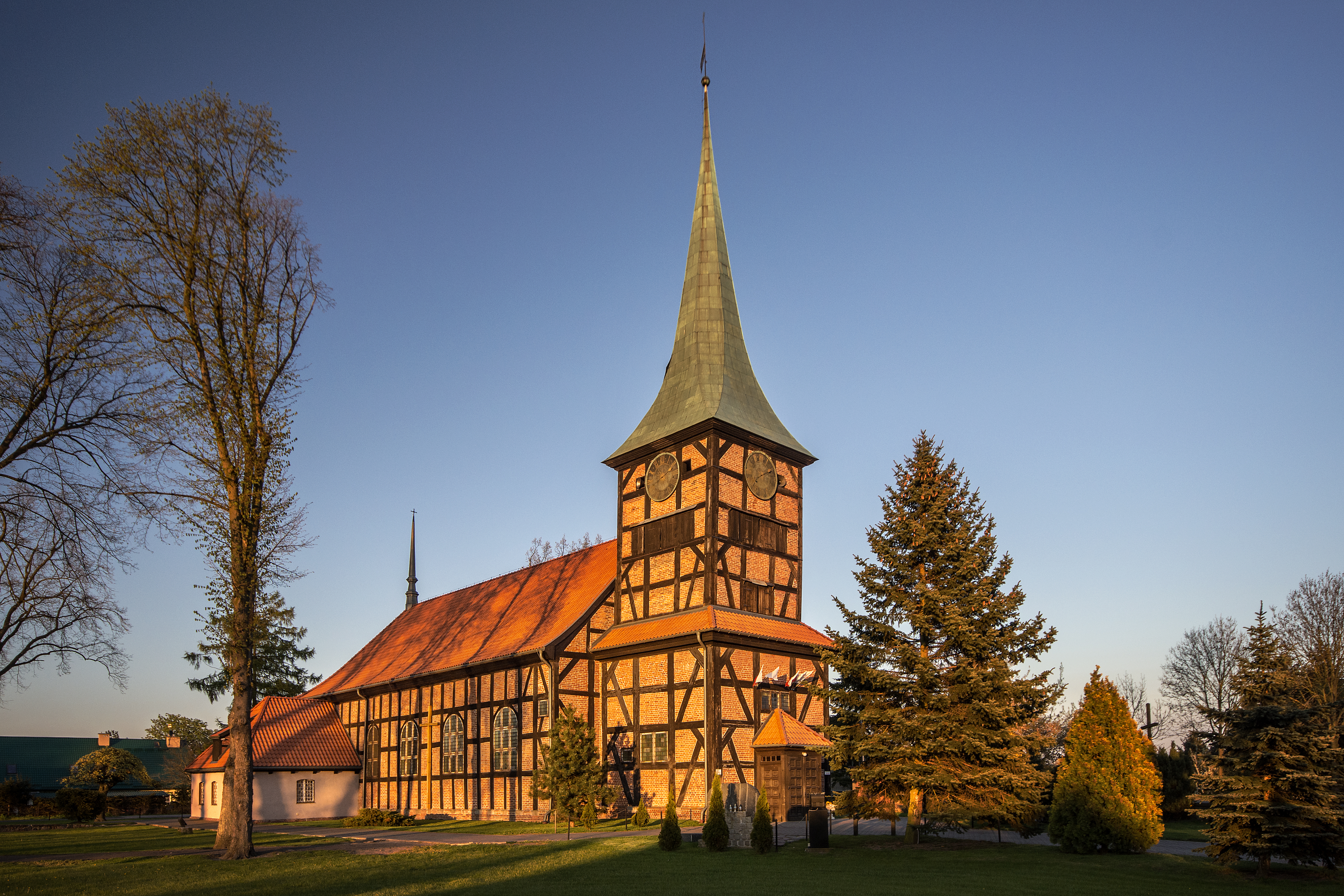 Stegna, ul. Gdańska 1 - dawny kościół ewangelicki, obecnie rzymskokatolicki parafialny p.w. Najświętszego Serca Pana Jezusa, 1682-1683